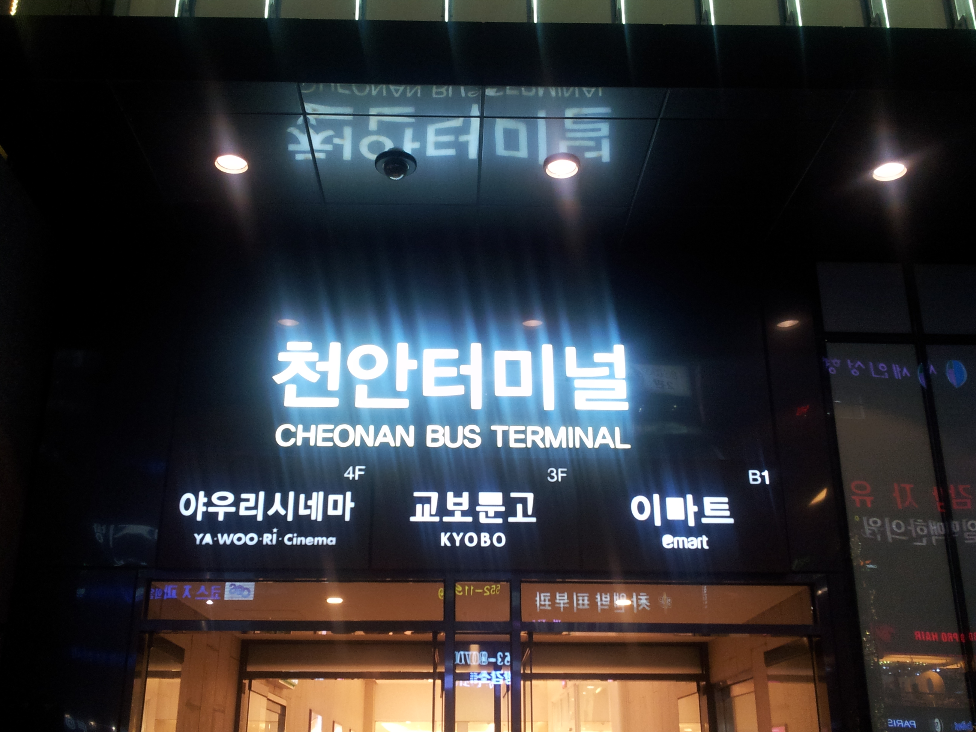 천안종합버스터미널 입구 모습